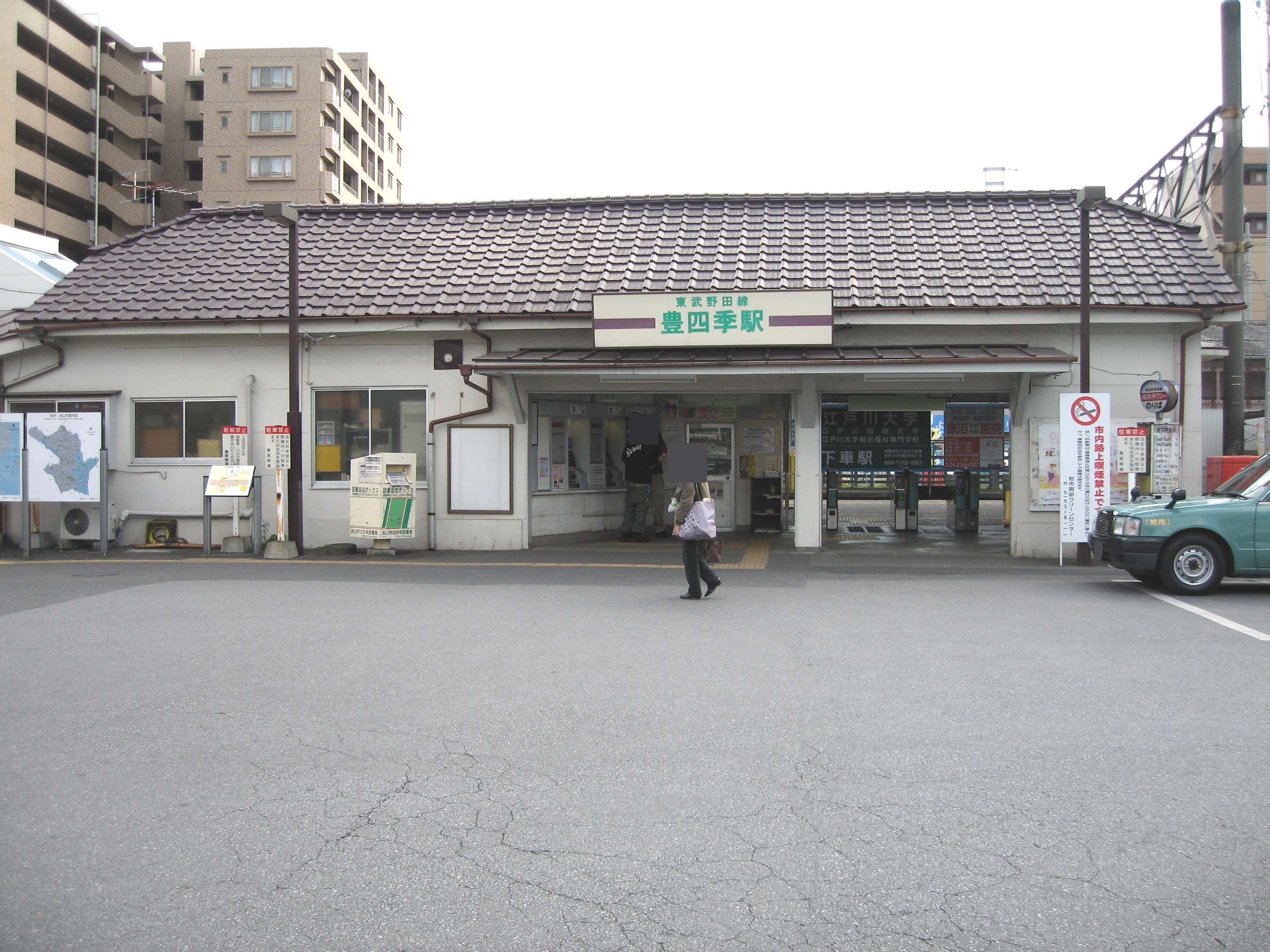 Toyoshiki station, Tobu-Noda Line, Chiba, Japan, 豊四季駅駅舎